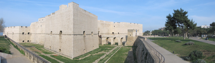 Barletta. Panoramica del Castello Svevo e di parte dei giardini del Castello.